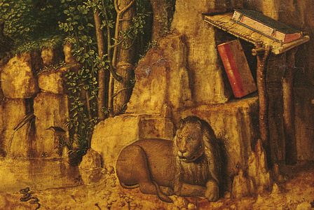 San Girolamo nel deserto, particolare